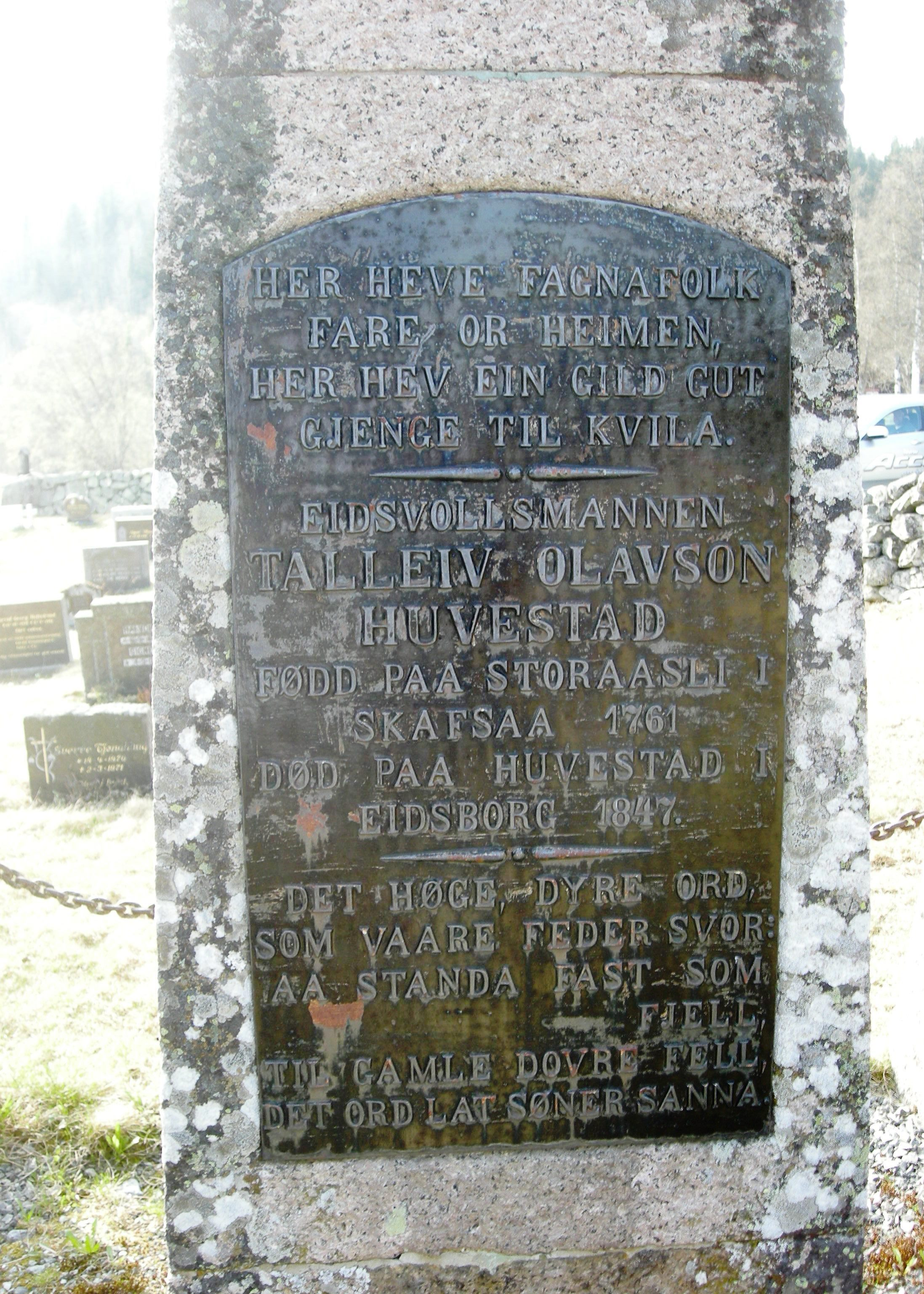 Minnebauta over Talleiv Olavson Huvestad utenfor Eidsborg stavkirke